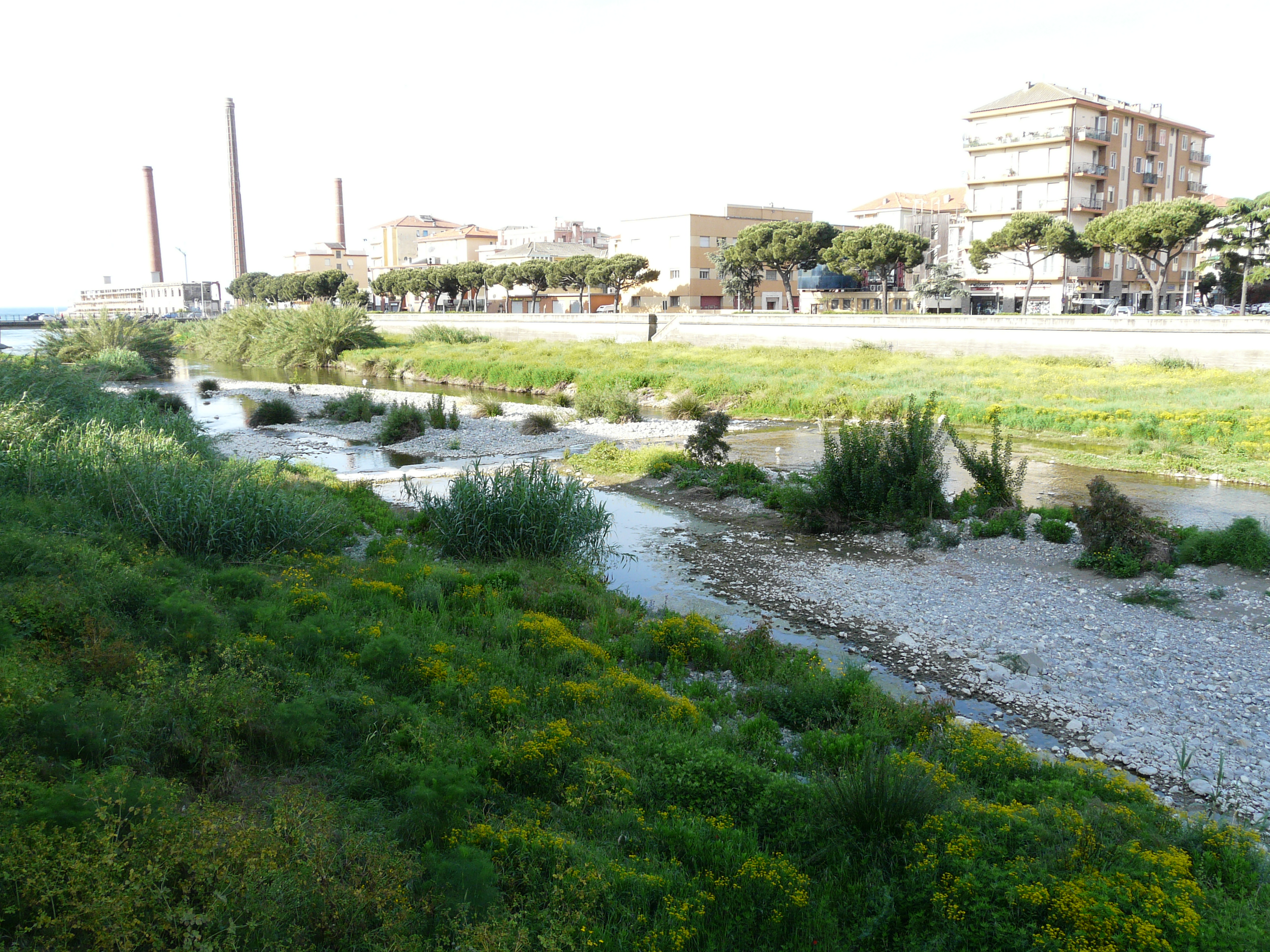 Torrente Impero, sponda di Oneglia, Comune di Imperia, Liguria, Italia